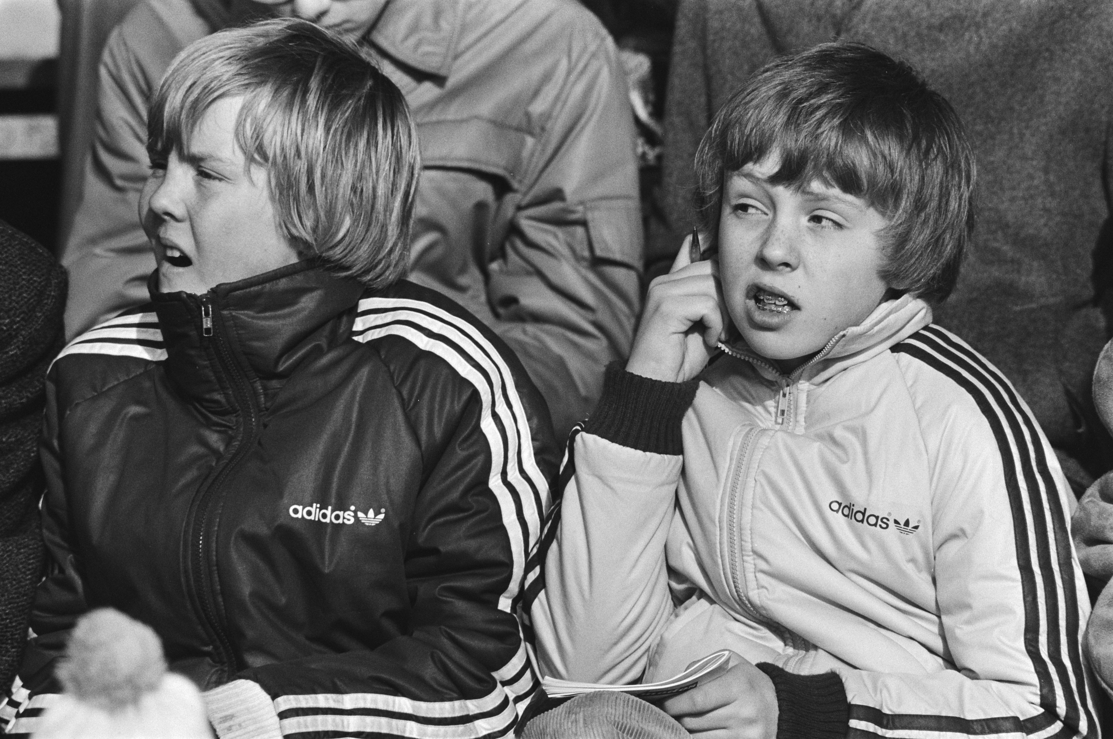 WK Sprint schaatsen in Alkmaar. Prins Willem Alexander (l.) en prins Johan Friso op de tribune.